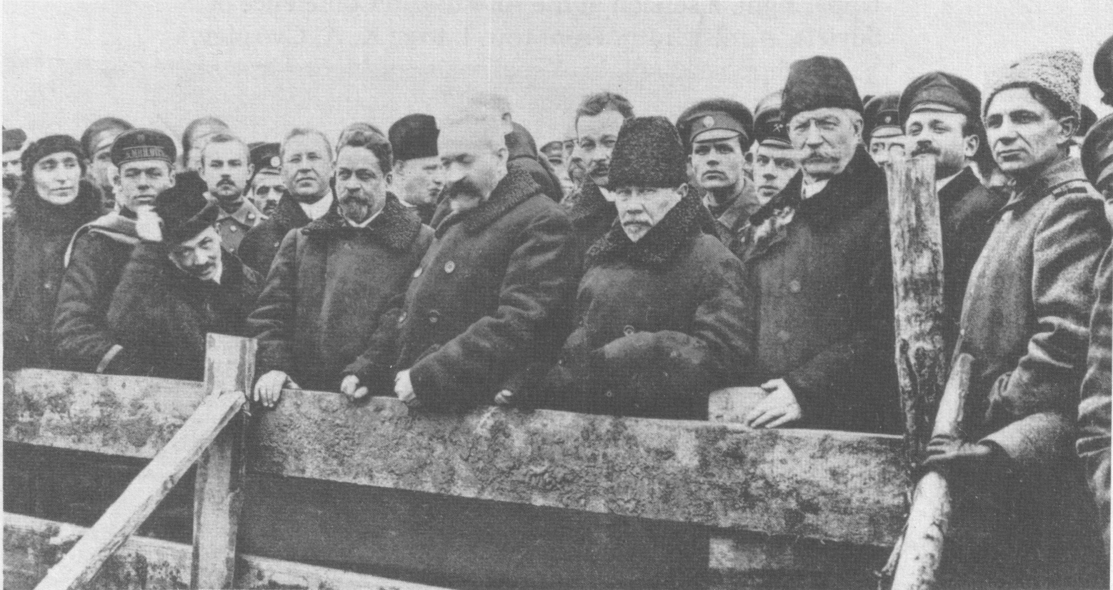 Ministros en el entierro de las víctimas de la Revolución de Febrero. Entre ellos, de izquierda a derecha: Konovalov, Shingarev, Lvov, Nekrasov, Godnev y Miliukov.